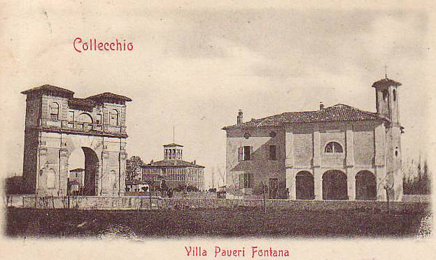 Villa Paveri Fontana dietro all'Arco del Bargello e all'oratorio della Madonna di Loreto